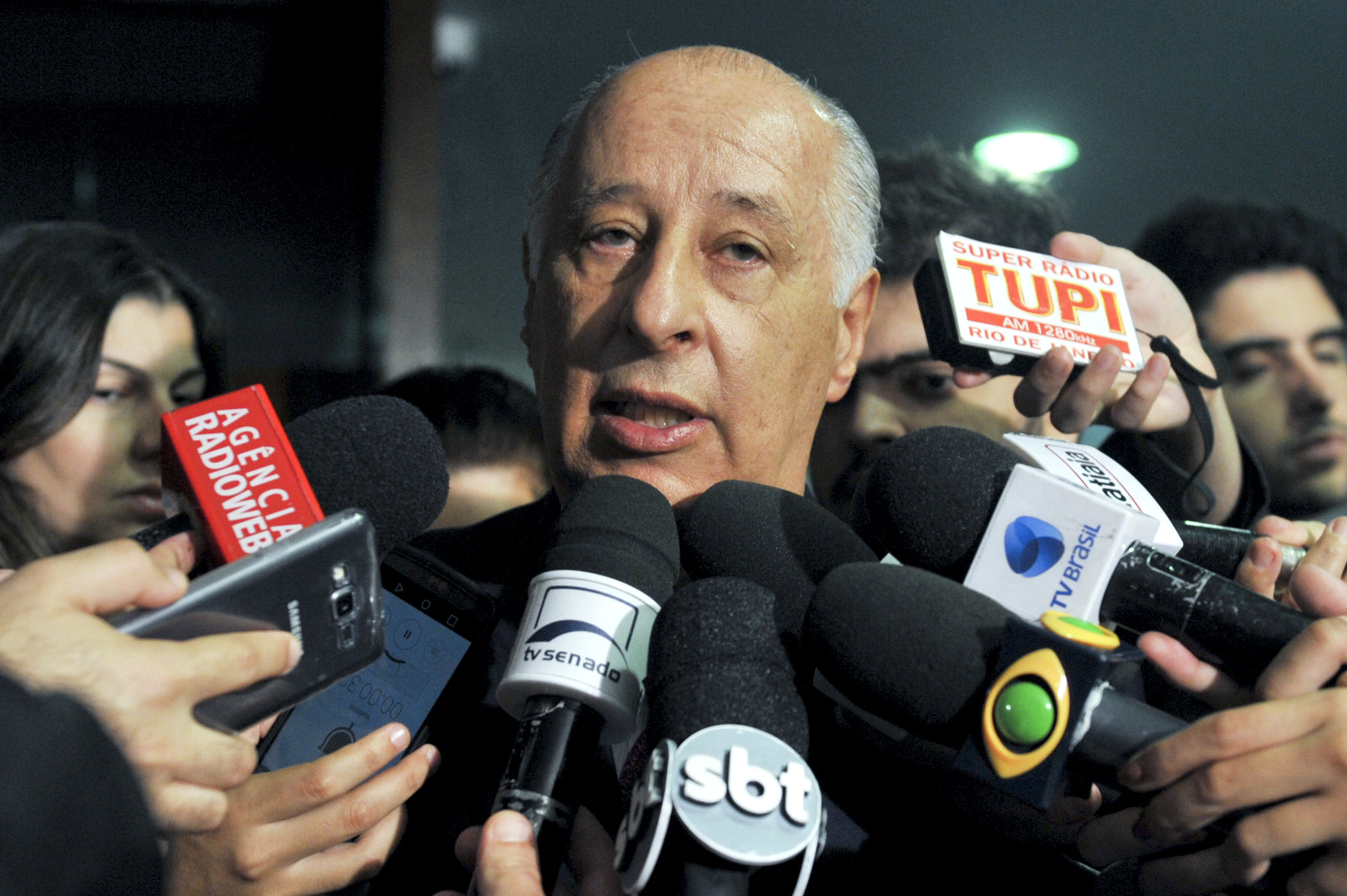 Presidente da Confederação Brasileira de Futebol, Marco Polo Del Nero, concede entrevista. Foto: Jane de Araújo/Agência Senado